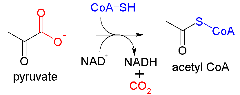 Pyruvate_dehydrogenase_complex_reaction